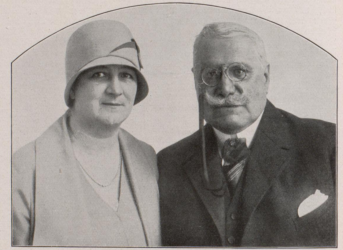 Porträtfoto von Ernesto Quesada mit seiner Ehefrau